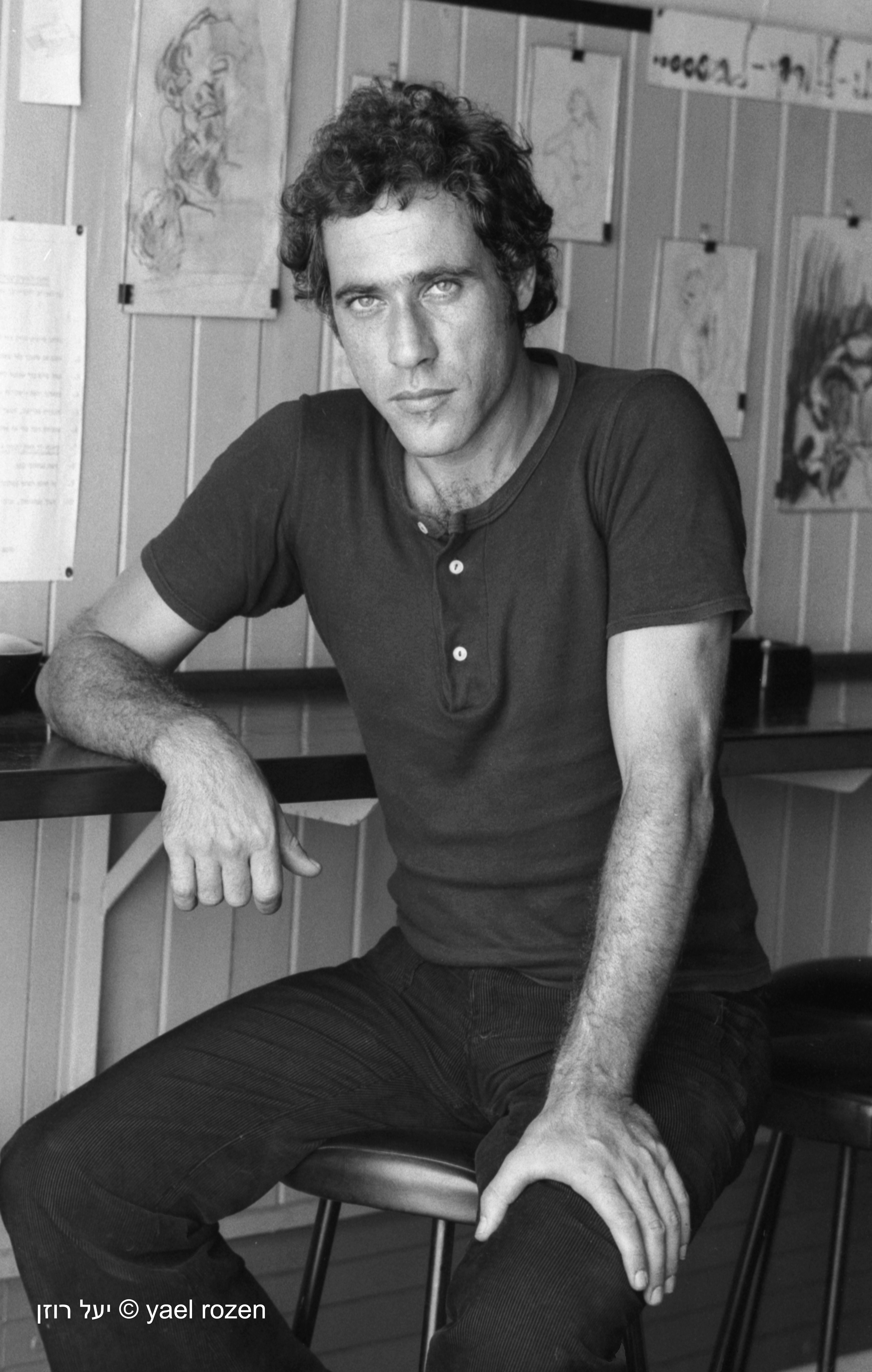 יוסי וירז'נסקי. צילום מקצועי על ידי הצלמת יעל רוזן. קיוסק ליד התיאטרון הלאומי "הבימה", 1974.